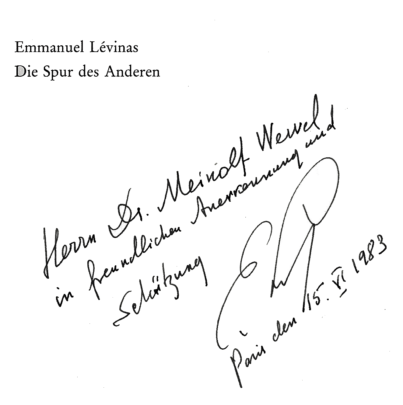 Handschriftliche Widmung des Buches "Die Spur des Anderen" an Meinolf Wewel